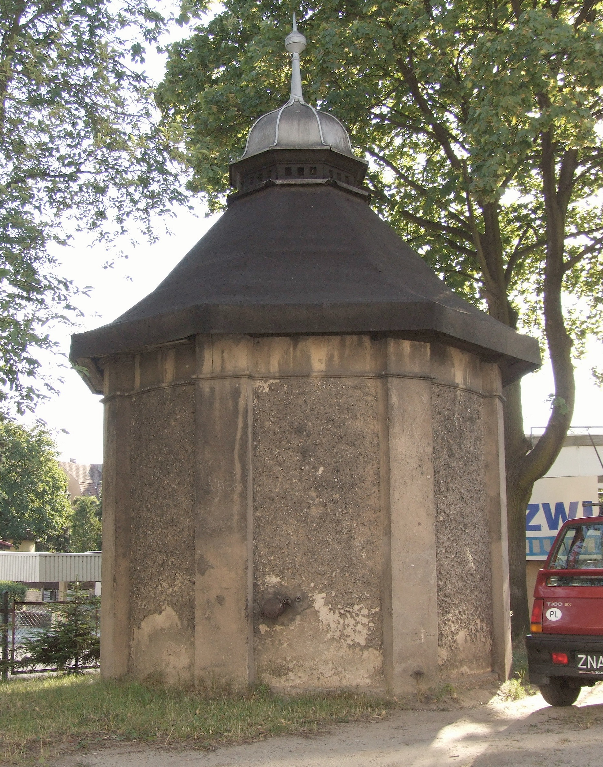 Budynek dawnej łaźni żydowskiej w Zielonej Górze. (Podwórko bloku przy ulicy Wrocławskiej)